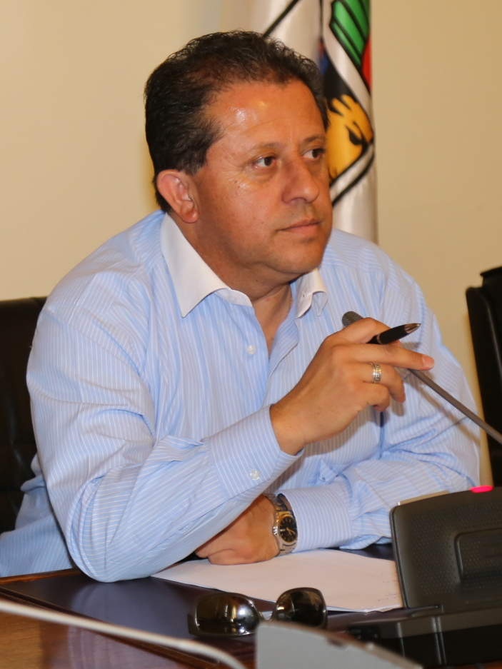 El director del Servicio de Salud O'Higgins, Fernando Troncoso, y el core Bernardo Cornejo, en abril de 2015